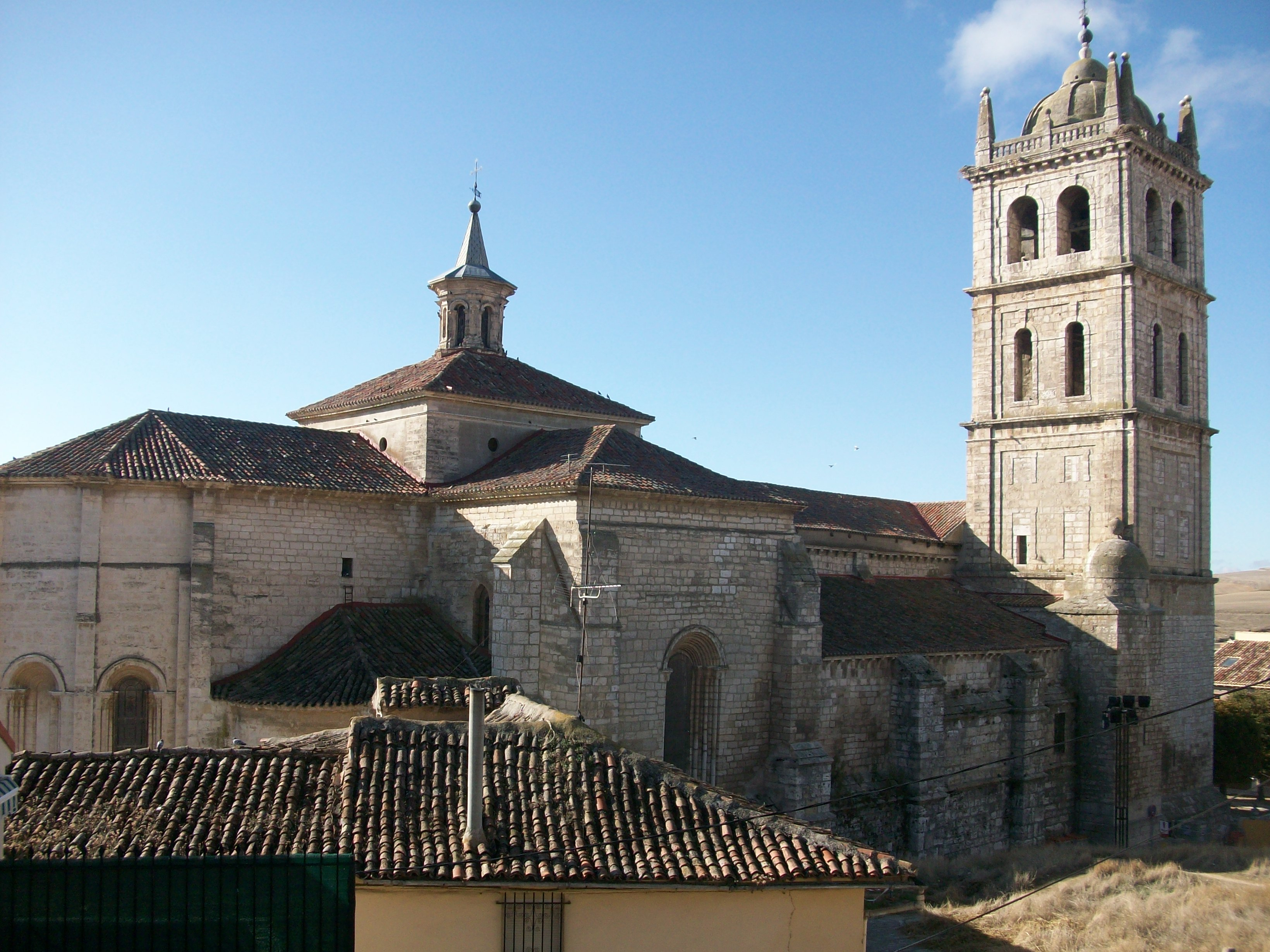 Iglesia parroquial de Santa María de la Asunción de Dueñas (Palencia).